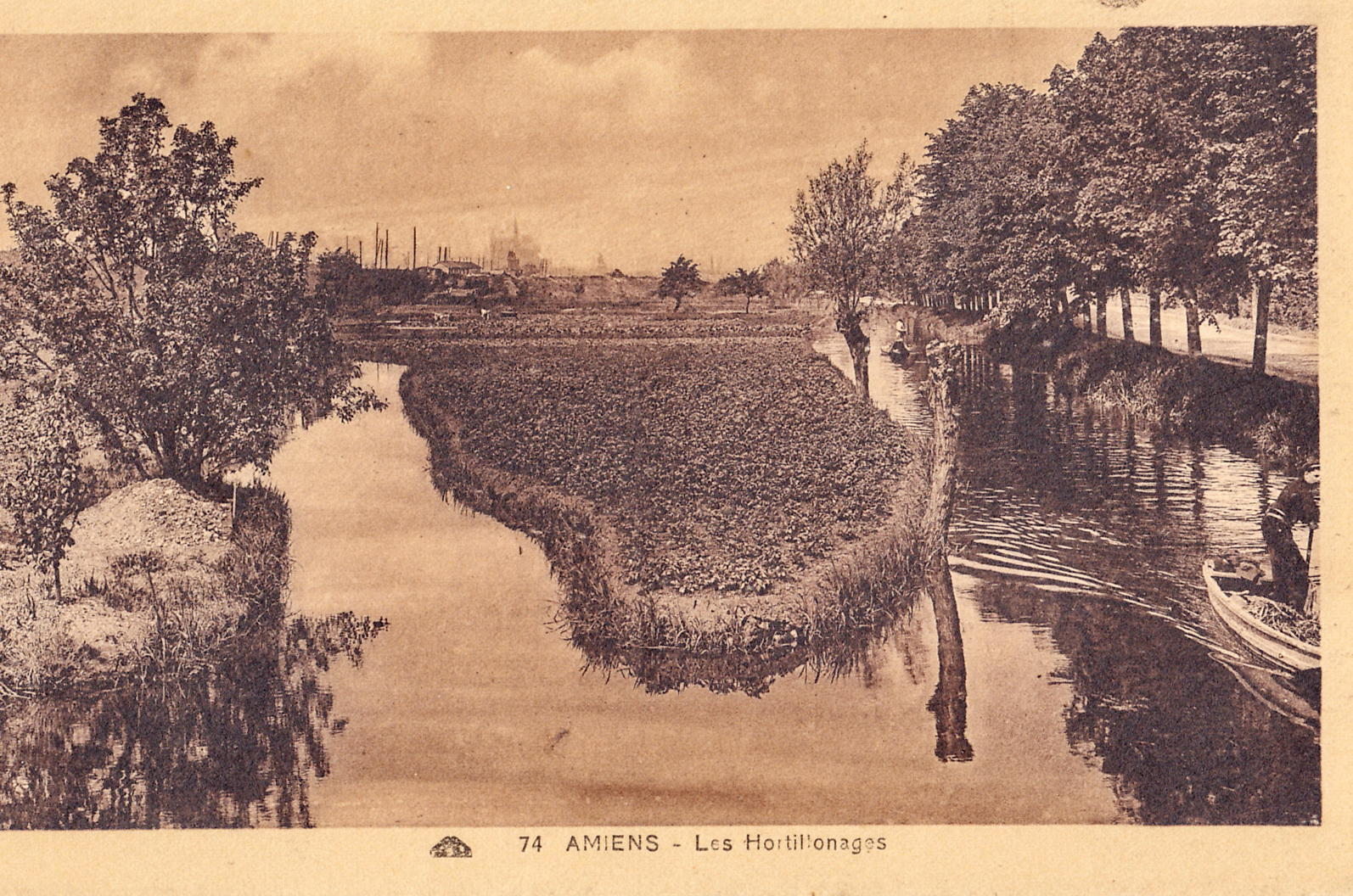 Carte postale ancienne éditée par CAP, n°74 :AMIENS - Les Hortillonnages